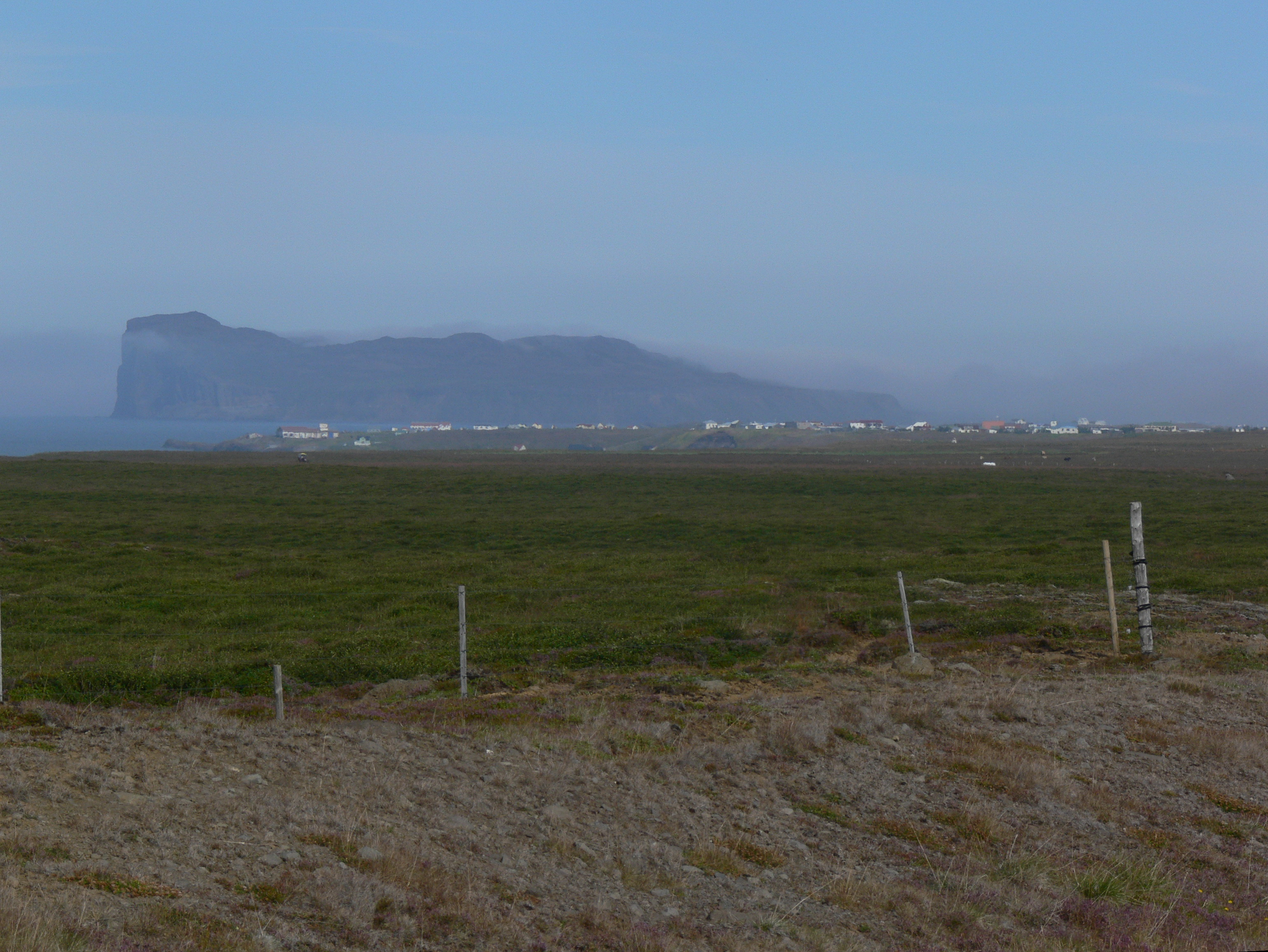 Skagafjörður. Hofsós, dahinter Kögur.